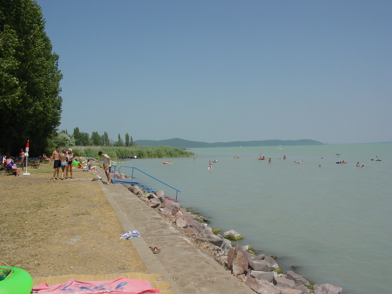 Balaton, Stako, July 2003